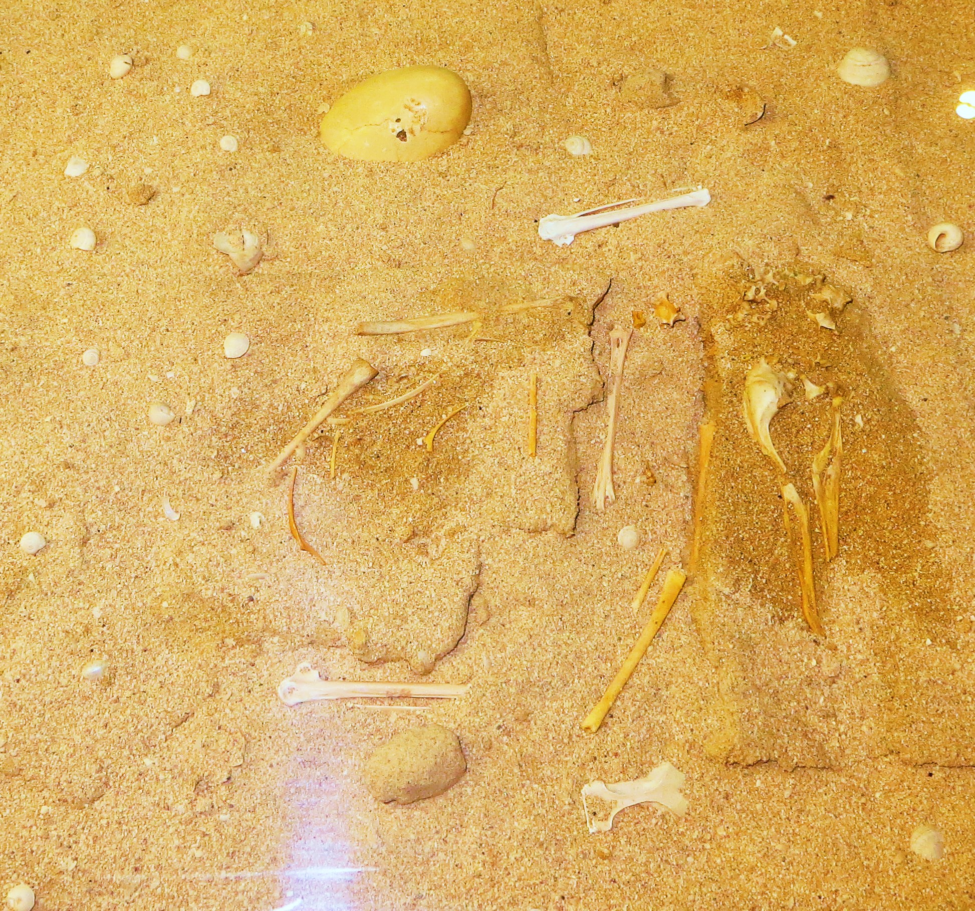 Fossil of Puffinus, an extinct bird- Took the picture at Museo de la Naturaleza y el Hombre - Tenerife